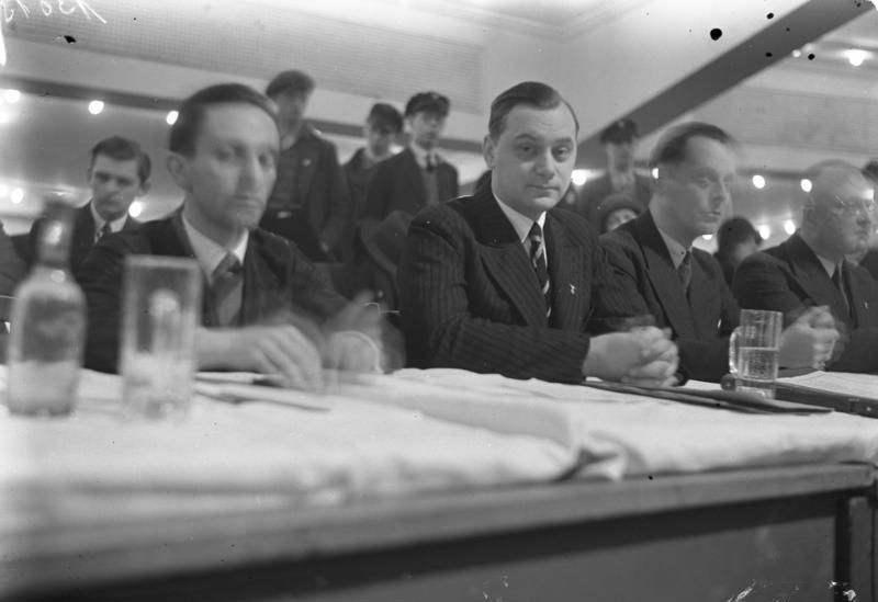 Hitlers "Aussenminister" spricht in Berlin ! Alfred Rosenberg, der Auslandsbevollmächtigte für Verhandlungen Adolf Hitlers, welcher Besprechungen im Auslande führte, hielt im Berliner Sportpalast eine grosse Rede, in welcher er sich über das System der Regierung Brüning auseinandersetzte.